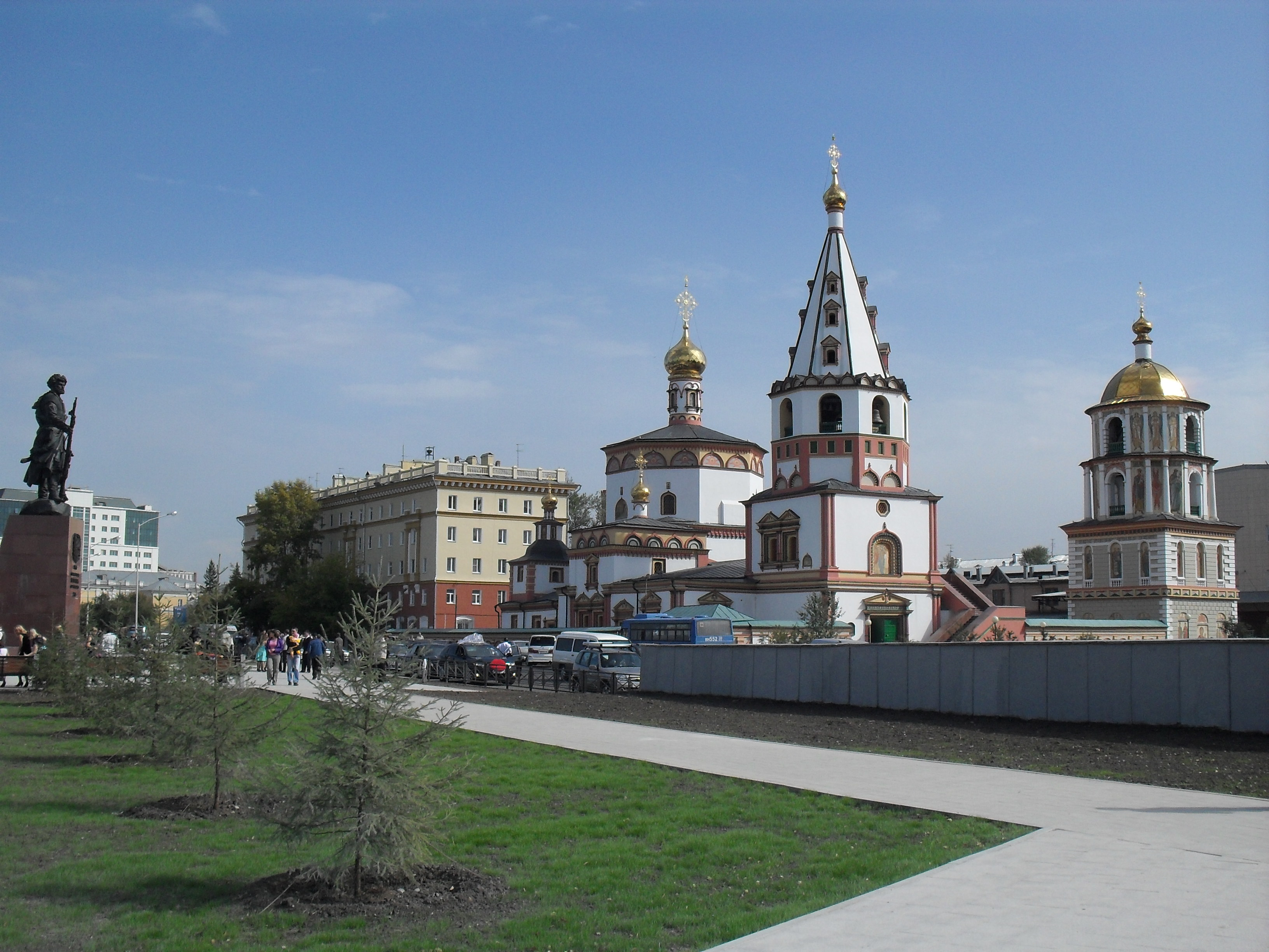 Иркутск. Иркутск. Богоявленский собор